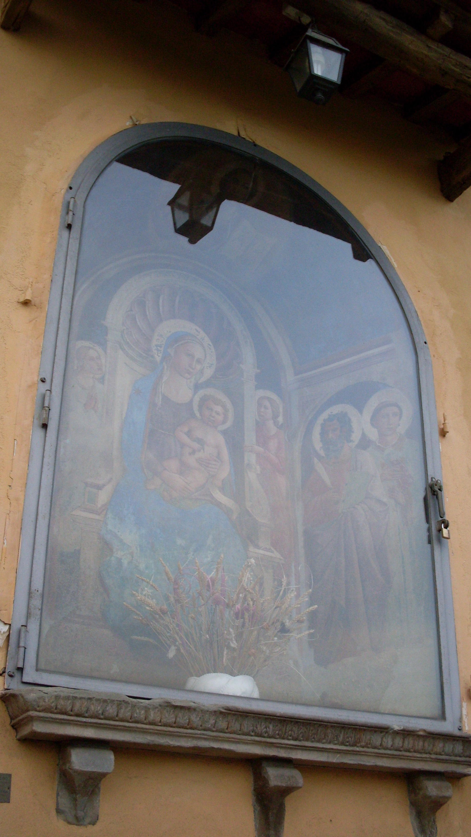 Tabernacolo di Benedetto Michelino, Signa (FI), Italia